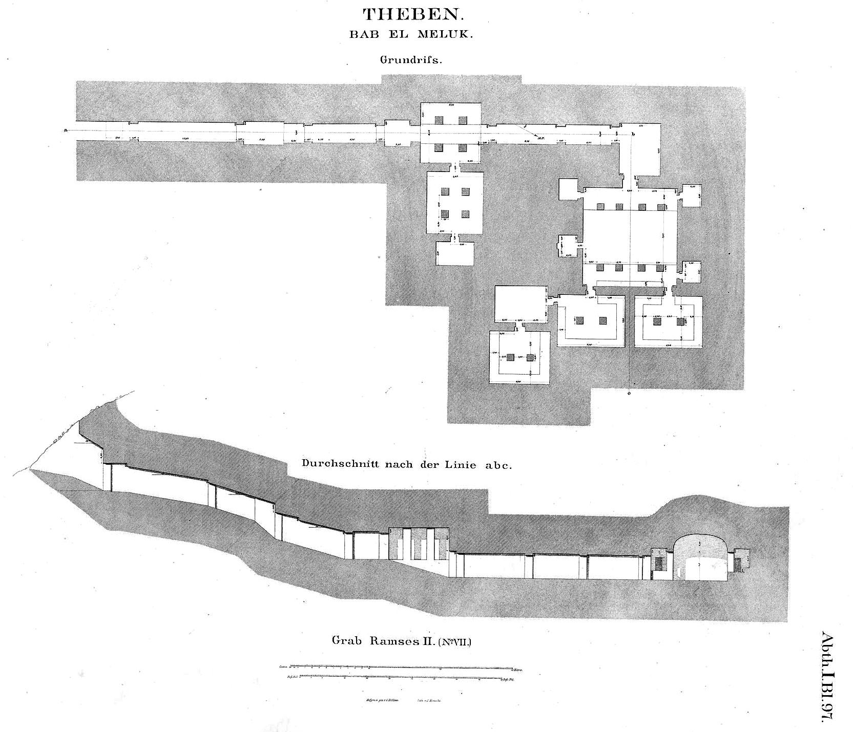 Denkmaeler aus Aegypten und Aethiopien nach den Zeichnungen der von Seiner Majestät dem Koenige von Preussen, Friedrich Wilhelm IV., nach diesen Ländern gesendeten, und in den Jahren 1842–1845 ausgeführten wissenschaftlichen Expedition auf Befehl Seiner Majestät